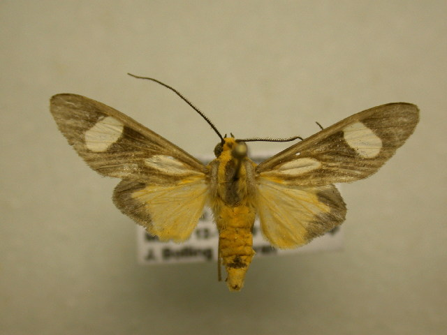 Glaucostola metaxantha